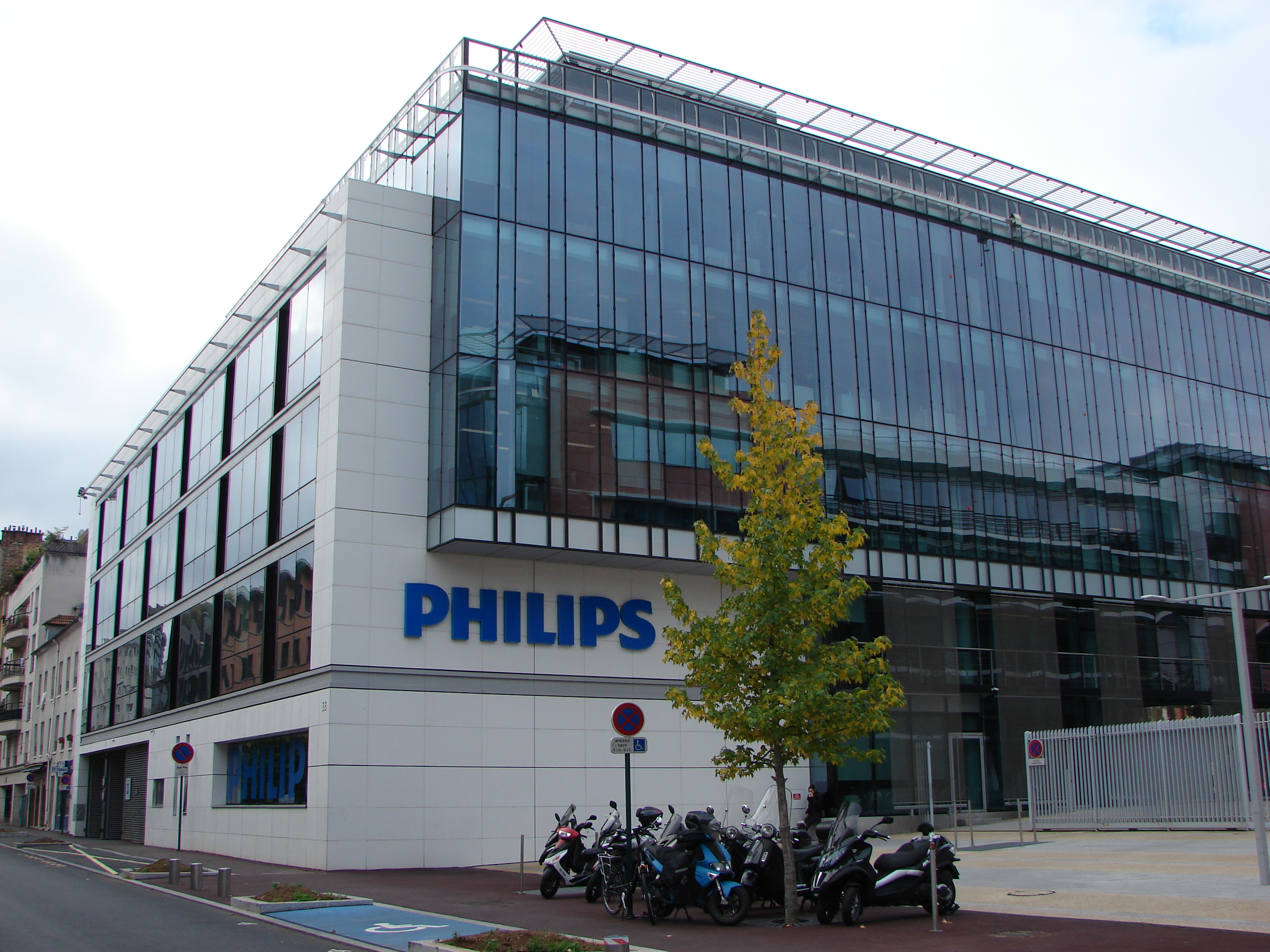 Siège de Philips France (ex Usine Philips) basé au 31-33 rue de Verdun à Suresnes